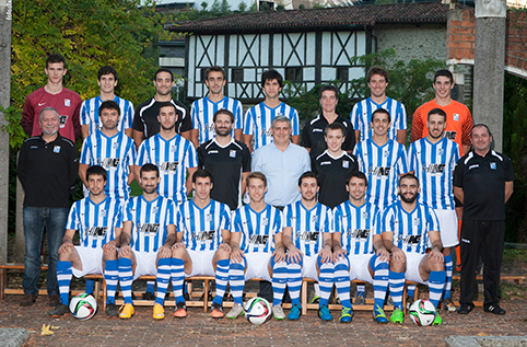 Plantilla 2015/2016 S.D. Beasain K.E.